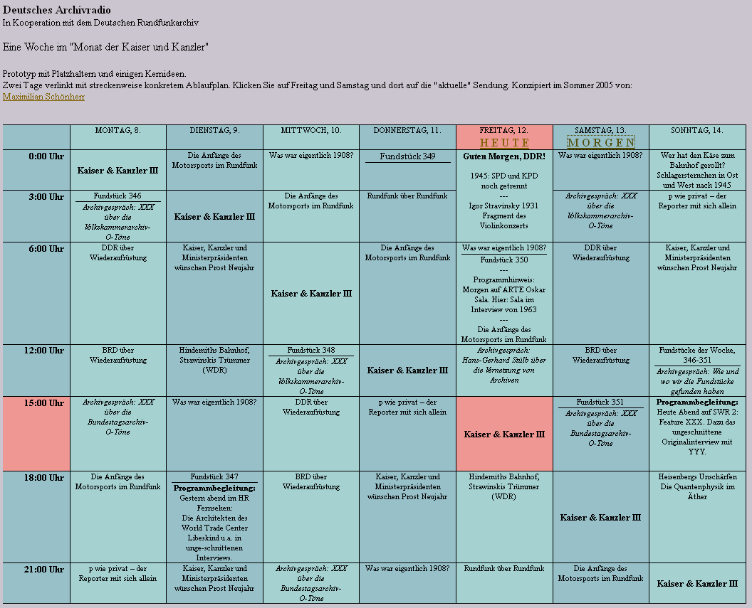 Konzept der Webseite mit dem Sendeschema eines deutschen Archivradios. Diese Liste besteht im Wesentlichen aus Platzhaltern und diente in der konzeptionellen Anfangsphase als Orientierung. Sie wurde auch erstellt, um den administrativen Aufwand und die Rechteklärung einschätzen zu können. Das 2007 als Protoyp beim SWR online gestellte Archivradio unterschied sich deutlich von diesem fein fragmentierten Konzept und streamte ohne zeitliches Schema eine Endlosschleife aus Originaltönen zu einem einzigen Thema. Im Konzept hieß es "Deutsches Archivradio", seit der Implementierung beim SWR nennt es sich "SWR 2 Archivradio".